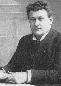 František Pácal (1865-1938), český operní pěvec, tenorista